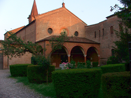 Ferrara, Monastero di Sant'Antonio Abate in Polesine: la chiesa.